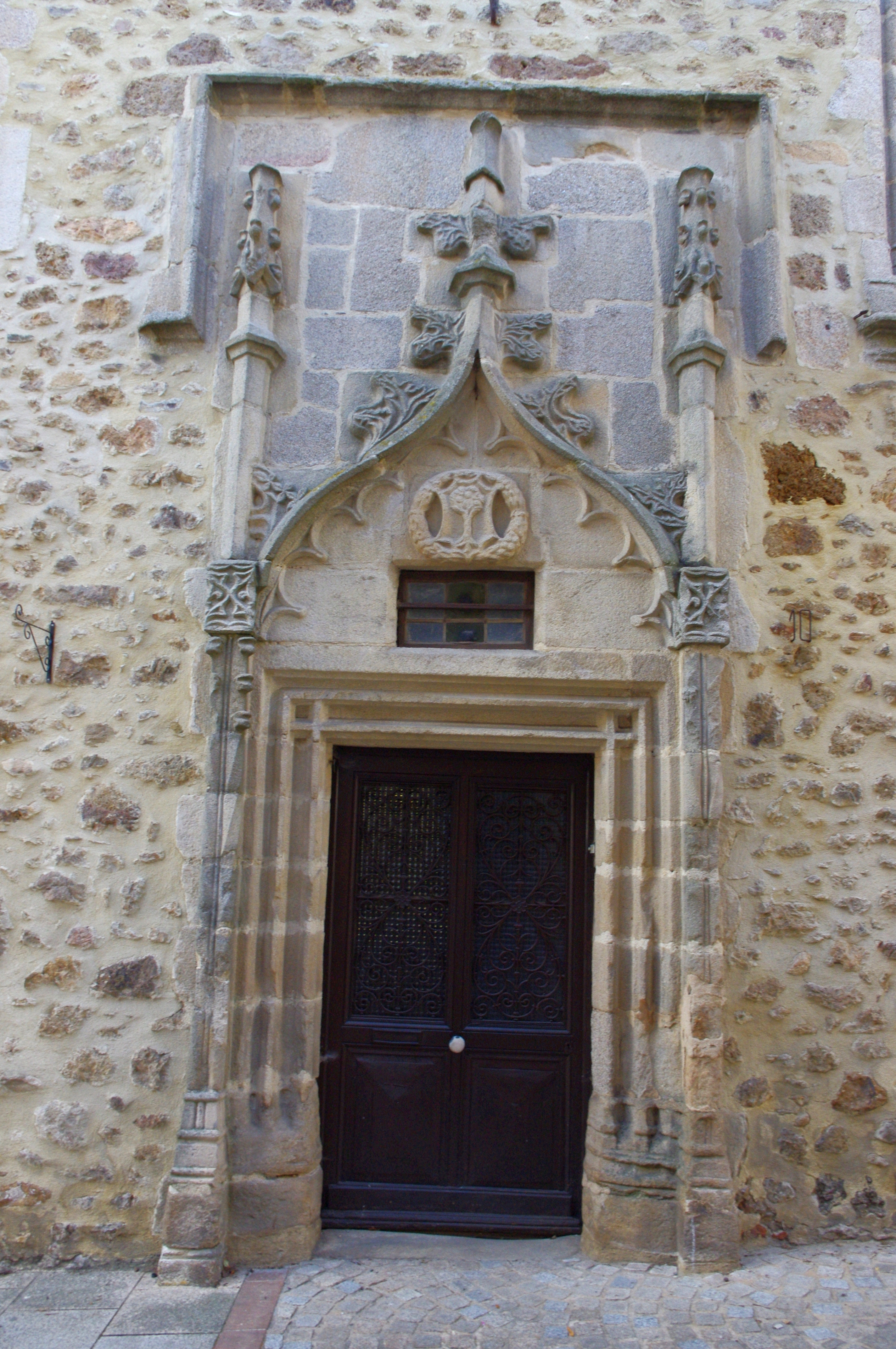 Maison, 10 rue Jean Parvy, Rochechouart.